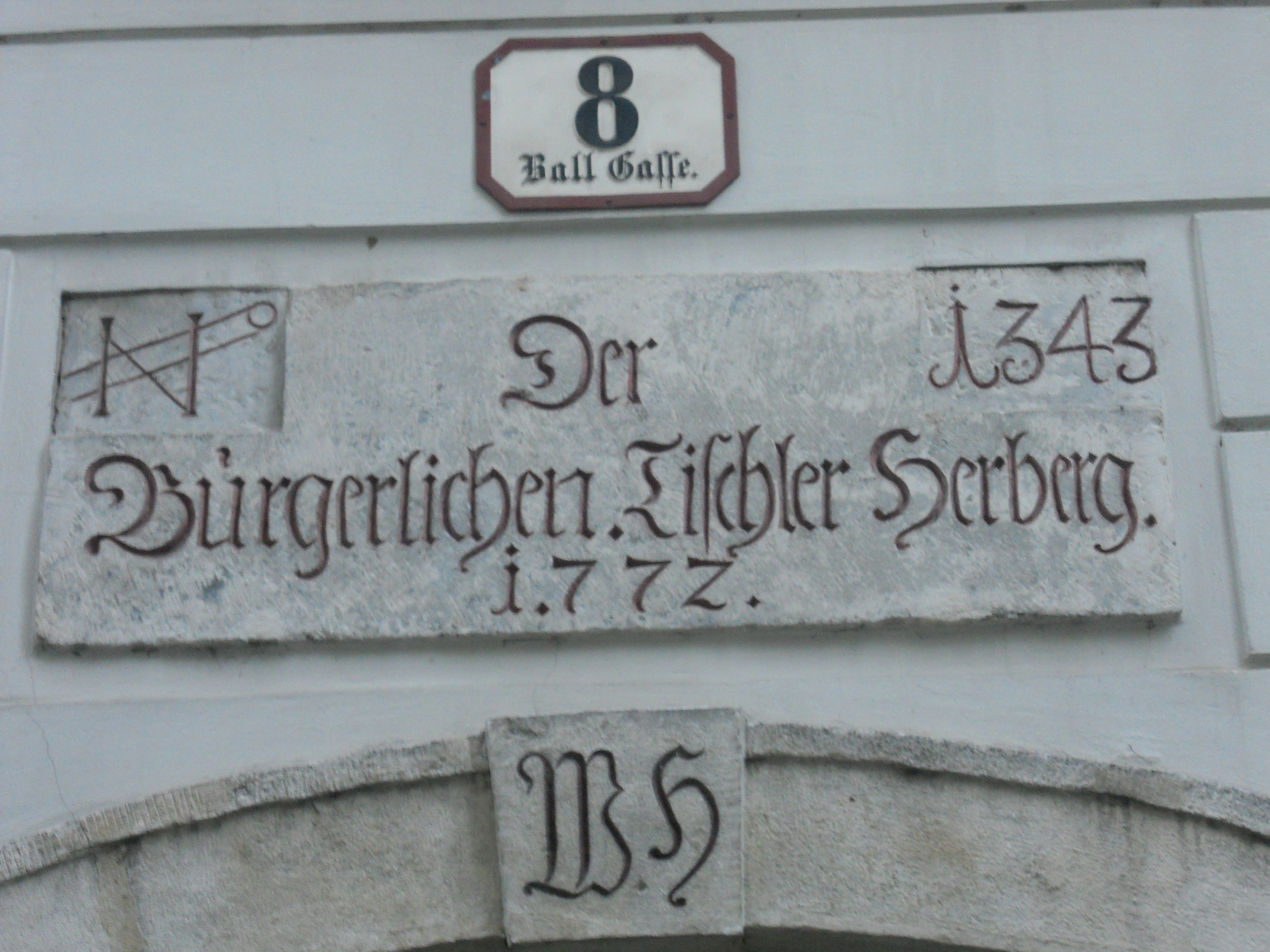 Bürgerhaus, Der bürgerlichen Tischler Herberg